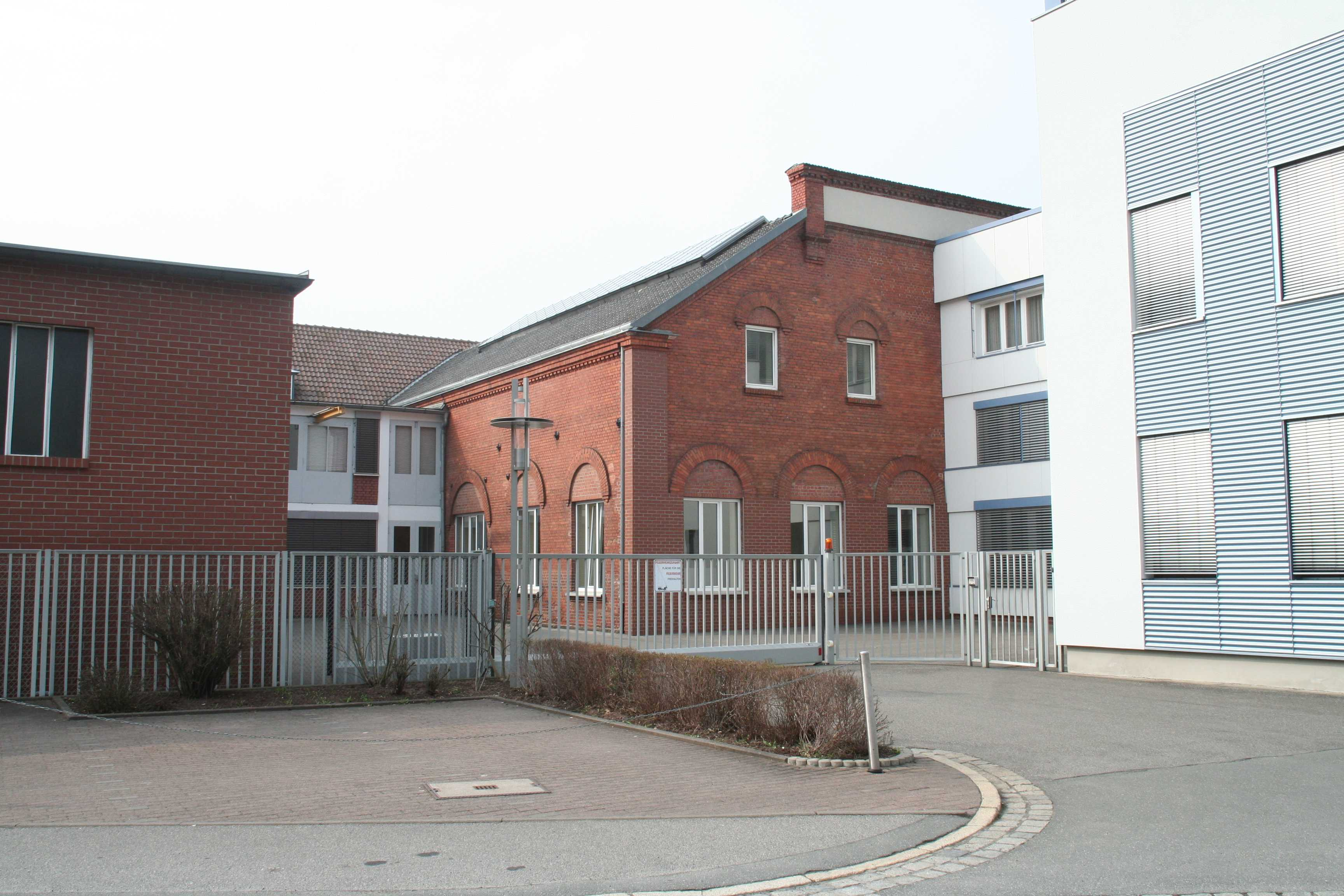 LASCO, Coburg-Cortendorf, Hahnweg 139